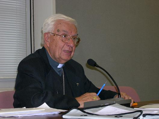 Mgr Jean Vilnet, ancien évêque de Saint-Dié, évêque émérite de Lille, démissionnaire de sa charge en 1998. Retiré à Nancy depuis cette date.